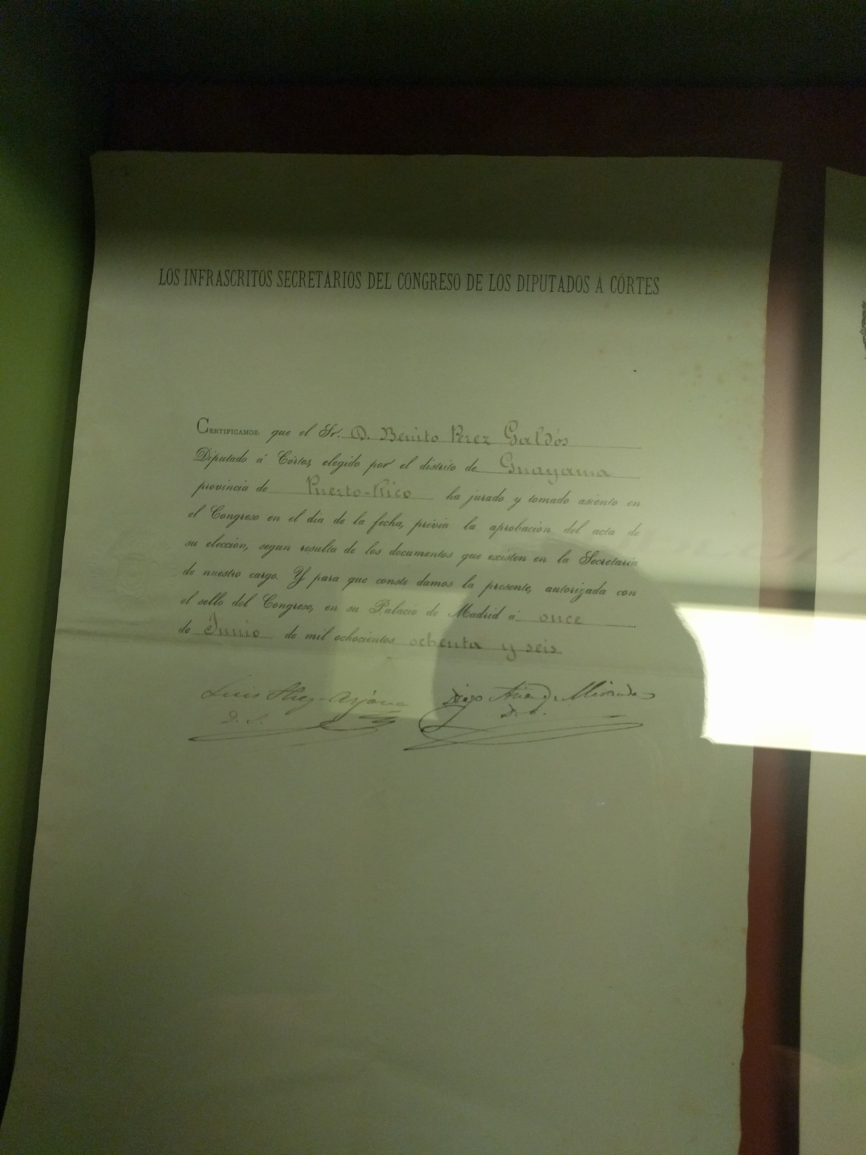 Certificado de la toma de posesión como Diputado en 1886 por Puerto Rico de Benito Pérez Galdós, Casa-Museo de Pérez Galdós